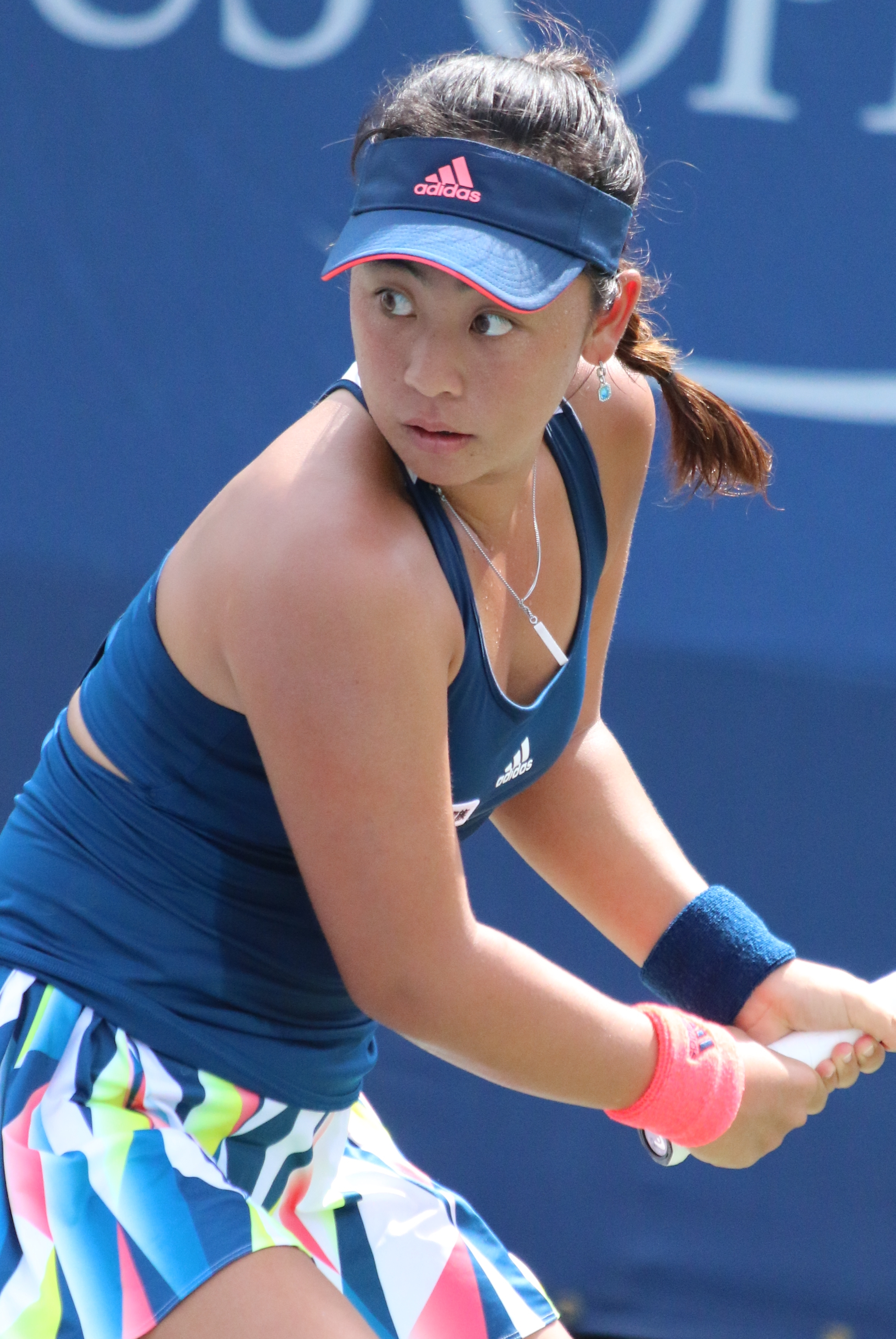 Hozumi US16 (7)